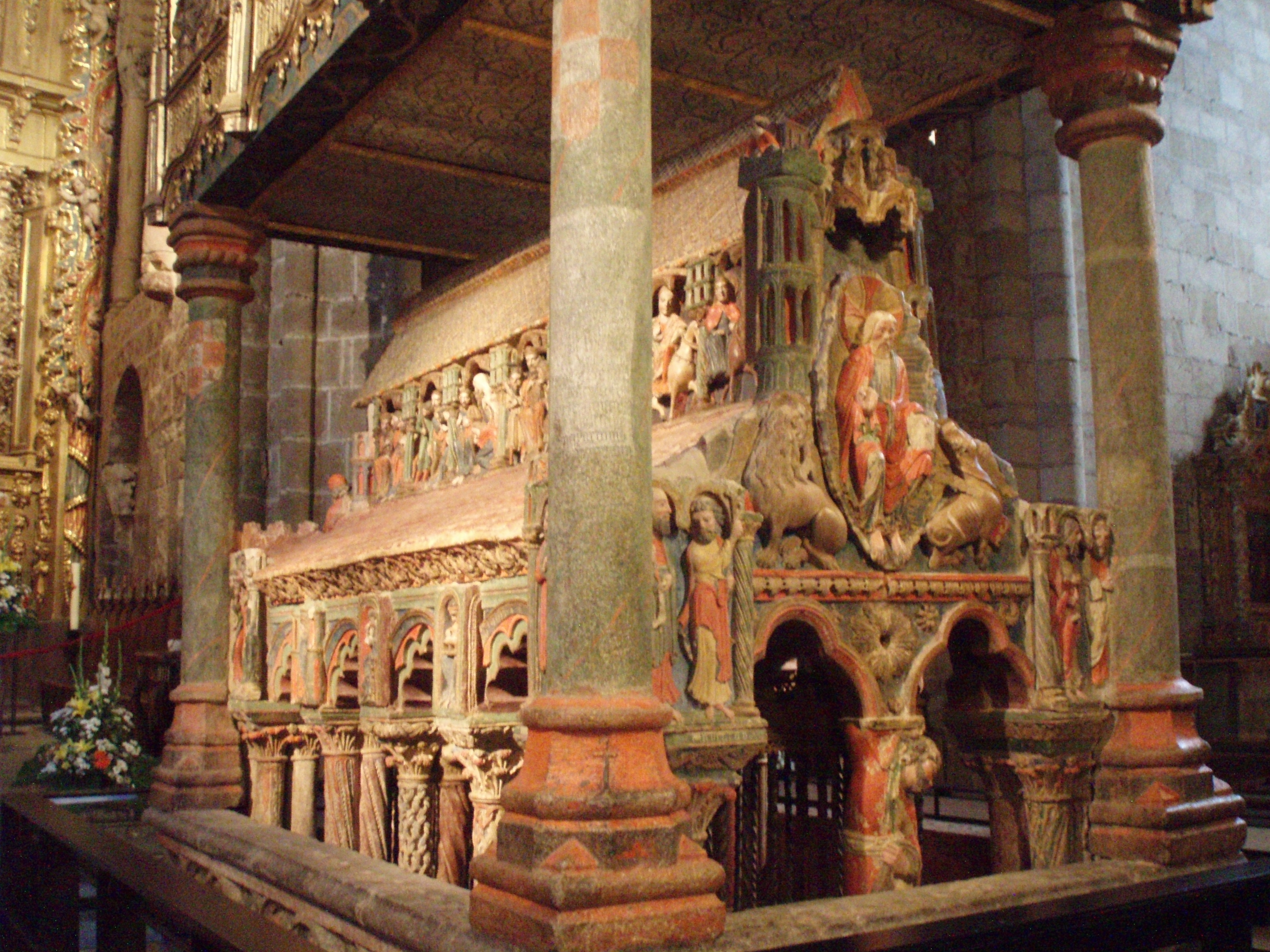 Sepulcro de los Santos Mártires Vicente, Sabina y Cristeta.